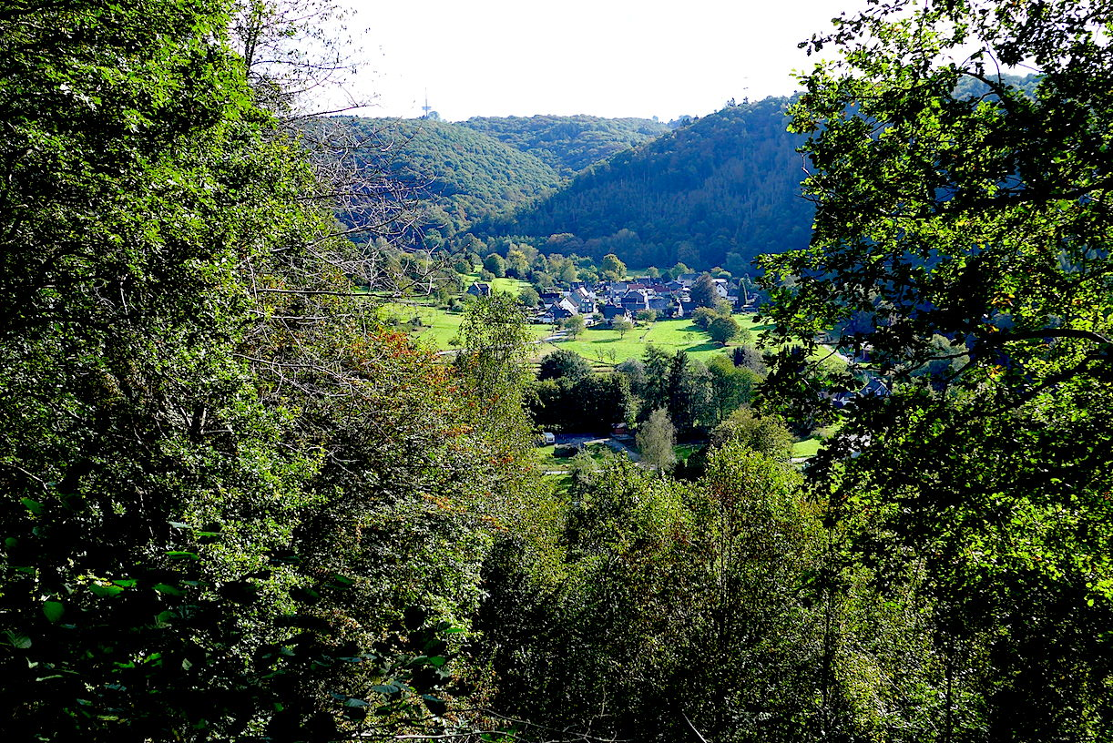 "Тропа Клинка" - туристский маркированнный маршрут вокруг немецкого города Золинген (Северный Рейн-Вестфалия). Шестой этап: вдоль реки Вуппер. 8.0 км.